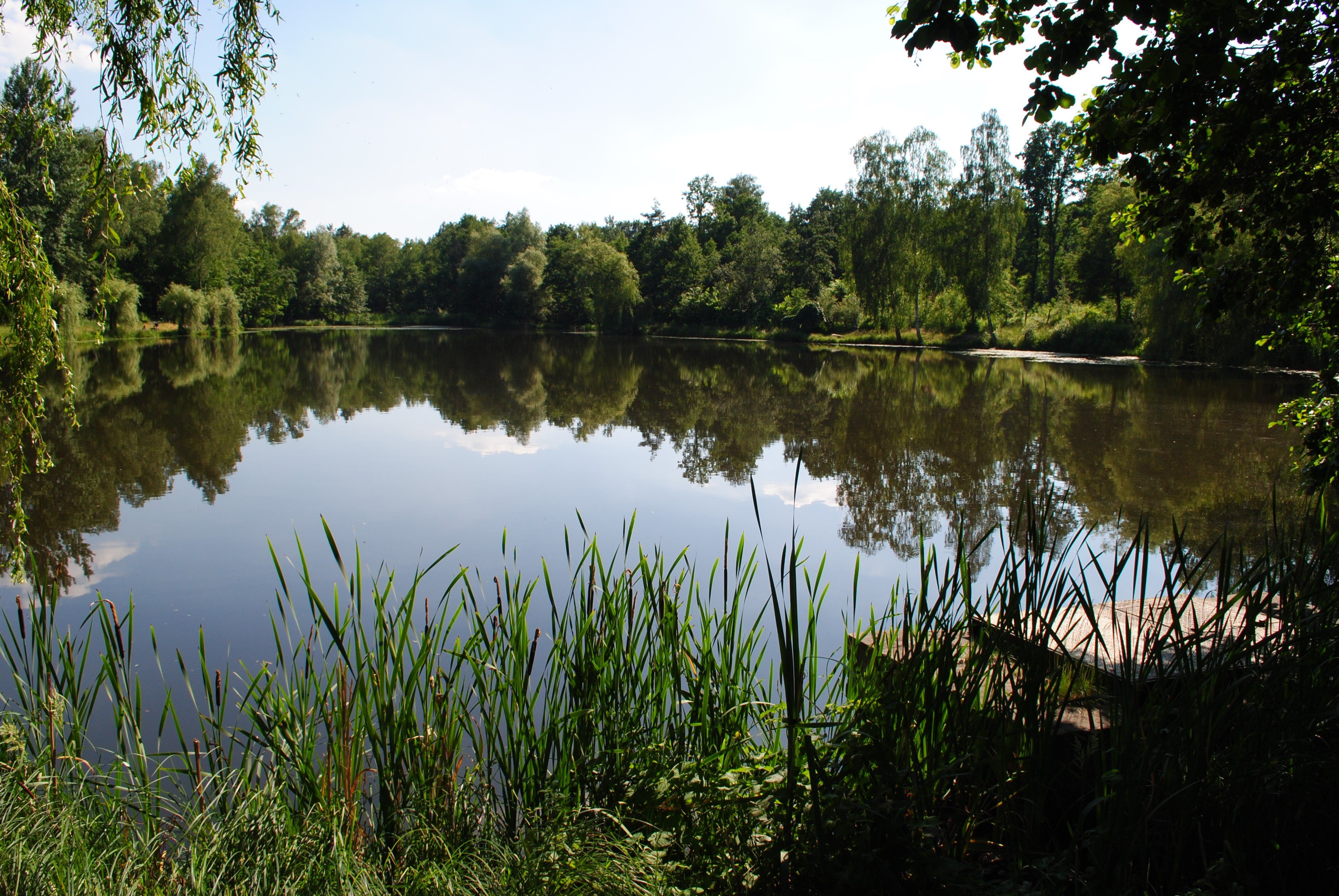 Katowice-Giszowiec. Staw Janina